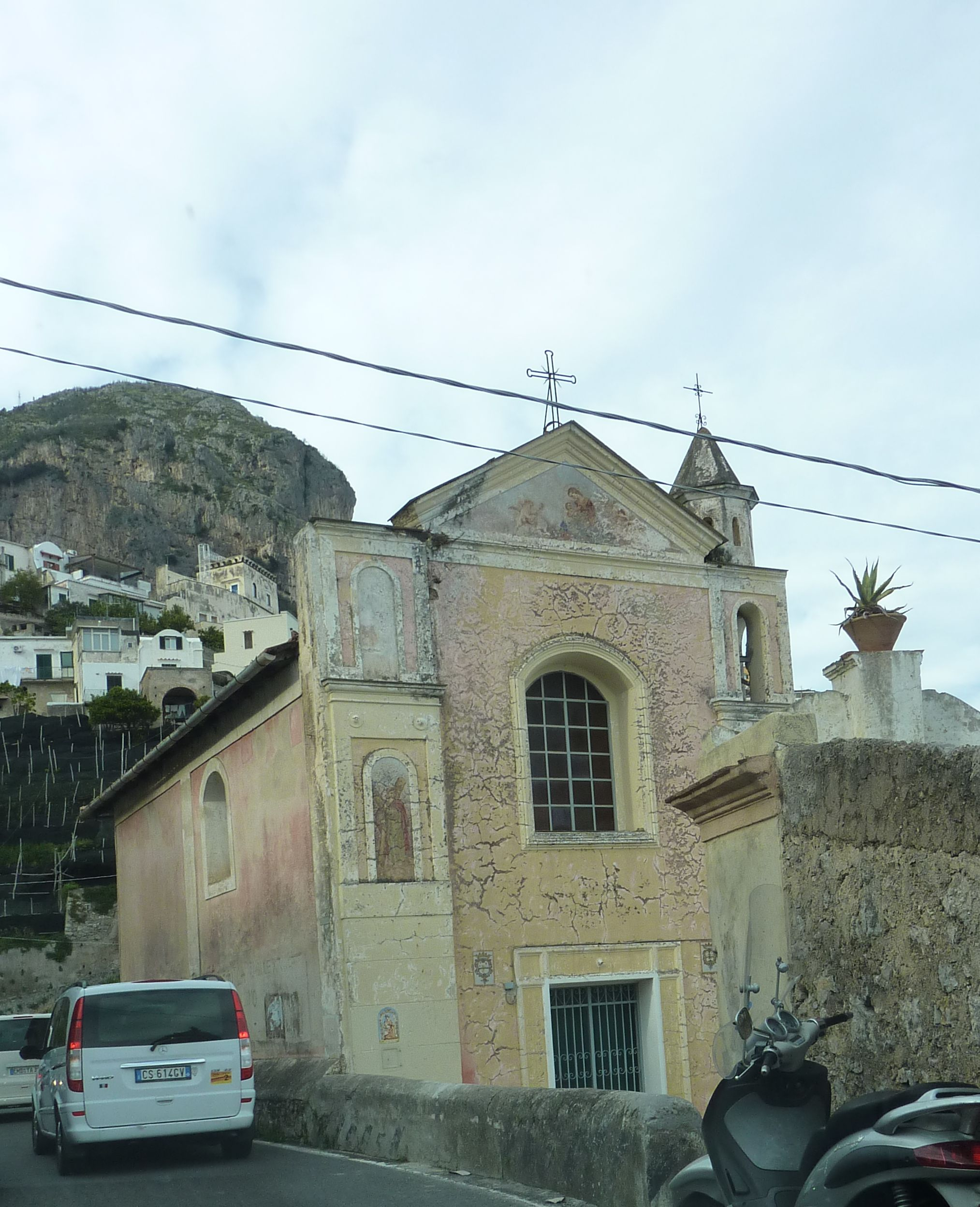 Vettica, Virgo Potens Kirche an der Amalfitana